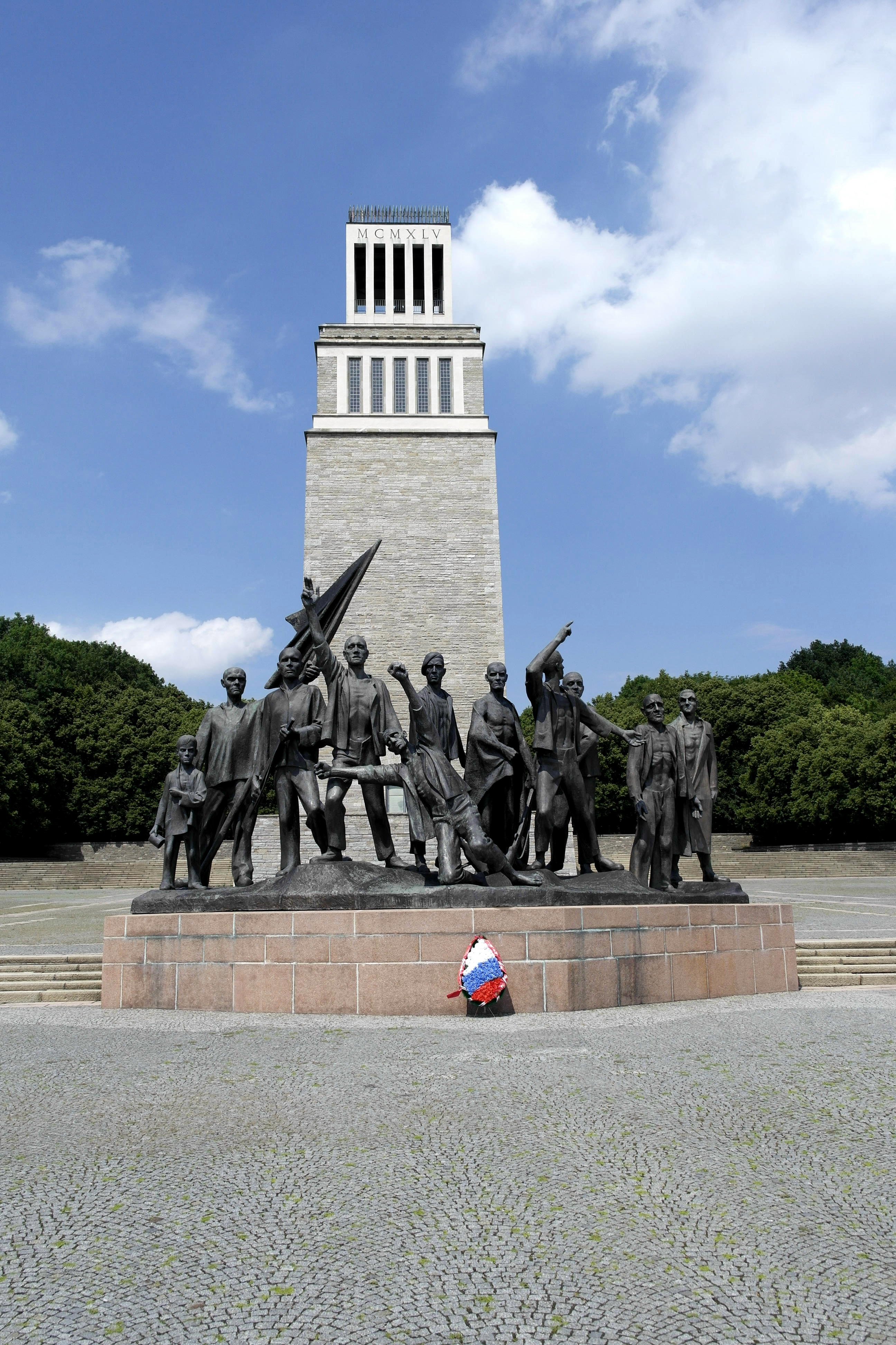 Gedenkstätte Buchenwald, Glockenturm mit Denkmal von Prof. Fritz Cremer